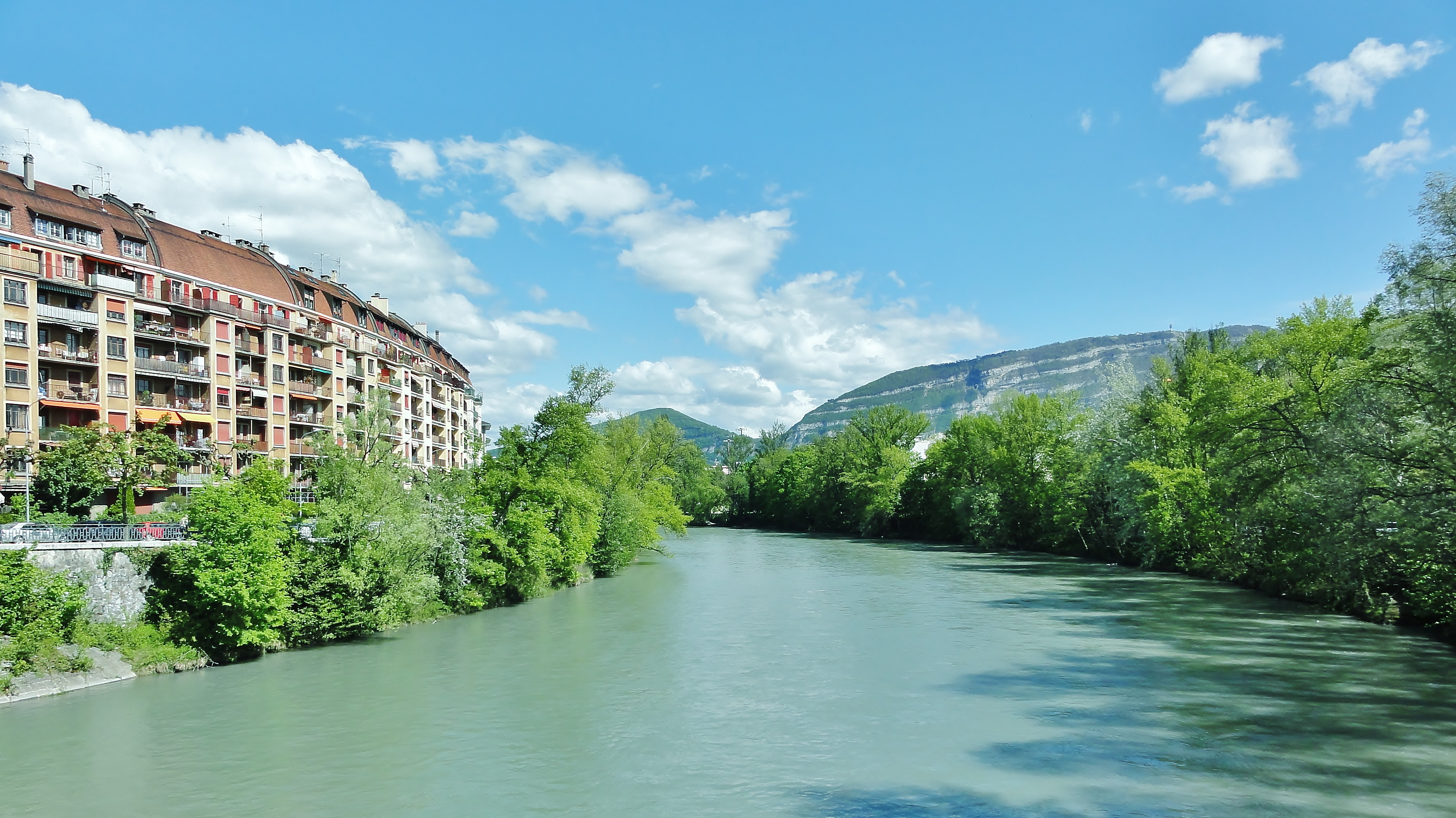 Vu de la rivière l'Arve et du Mont Salève, depuis le pont de Carouge (commune du canton Genève en Suisse)